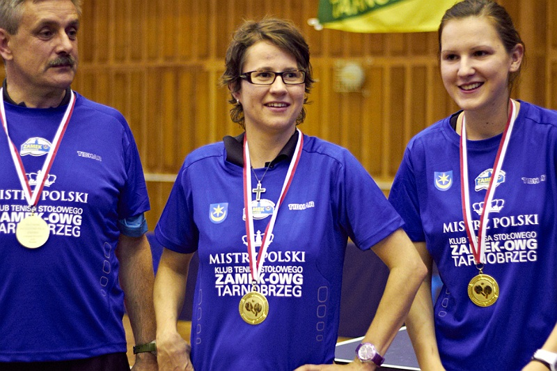 Renata Štrbíková (w środku) z trenerem Zbigniewem Nęckiem i koleżanką klubową Katarzyną Ślifirczyk, podczas dekoracji z okazji zdobycia tytułu Drużynowego Mistrzostwa Polski z KTS Zamek-OWG Tarnobrzeg w dniu 26.05.2012 roku.